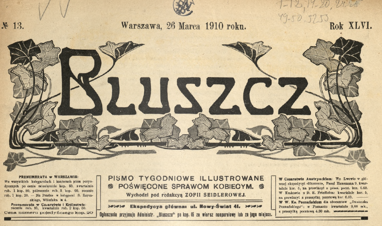 Winieta tygodnika „Bluszcz” z 1910 roku (nr 13) z widocznym nazwiskiem Zofii Seidler, redaktorki czasopisma w latach 1906-1918